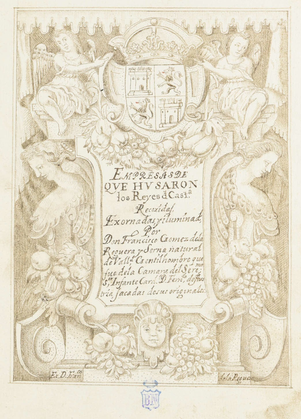 Portada del manuscrito de las "Empresas de los reyes de Castilla / recoxidas, exornadas y illuminadas por Francisco Gómez de la Reguera, gentilhombre de la Cámara del Infante Cardenal D. Fernando de Austria ; sacadas de las orixinales manuscritas del autor por D. Juan Antonio Fernández de la Reguera, secretario del secreto del Santo Oficio de la Inquisición de Valladolid". Dibujo a pluma, Biblioteca Nacional de España, Mss/17481